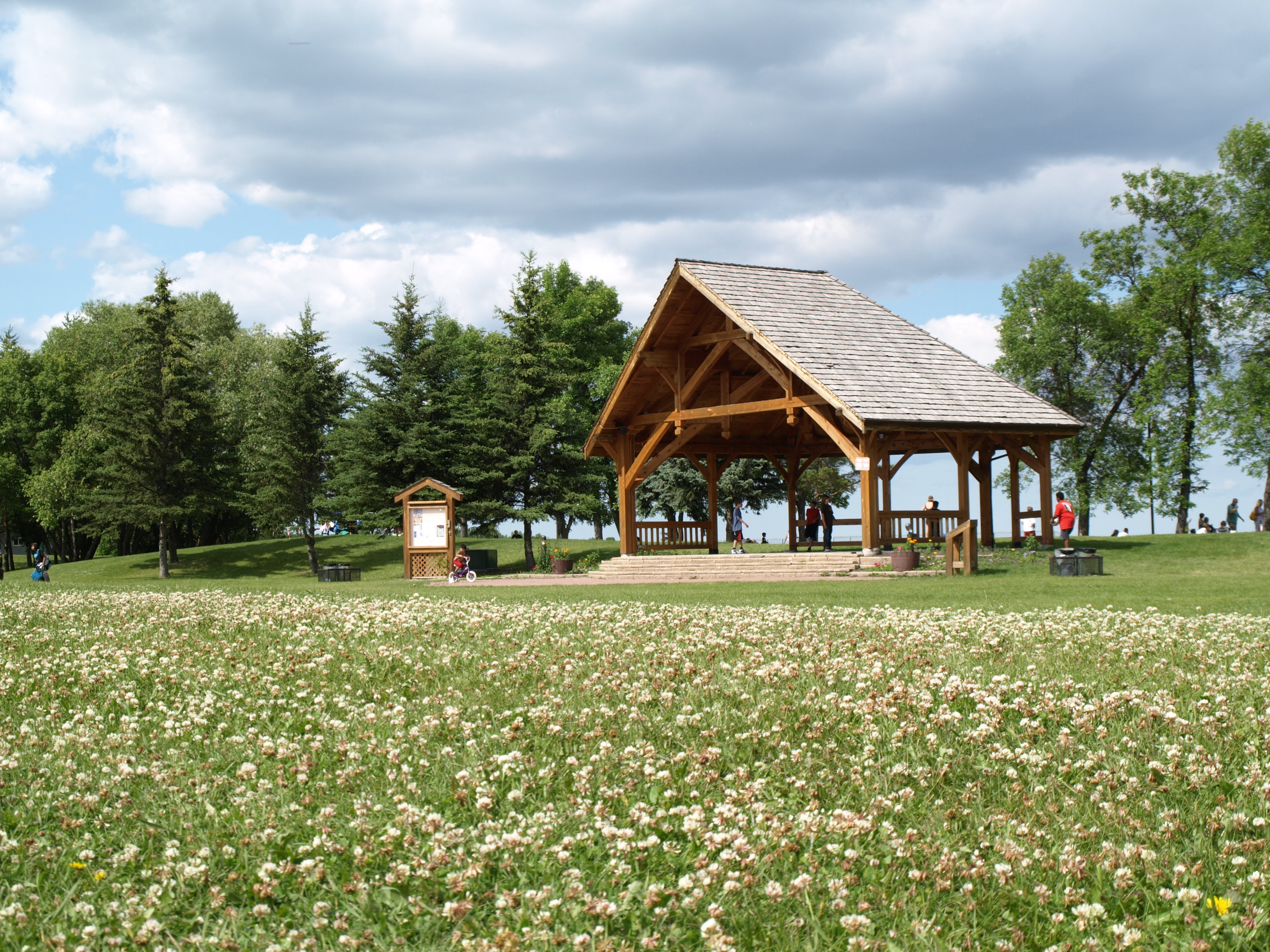 Winnipeg Beach Manitoba Canada 2009